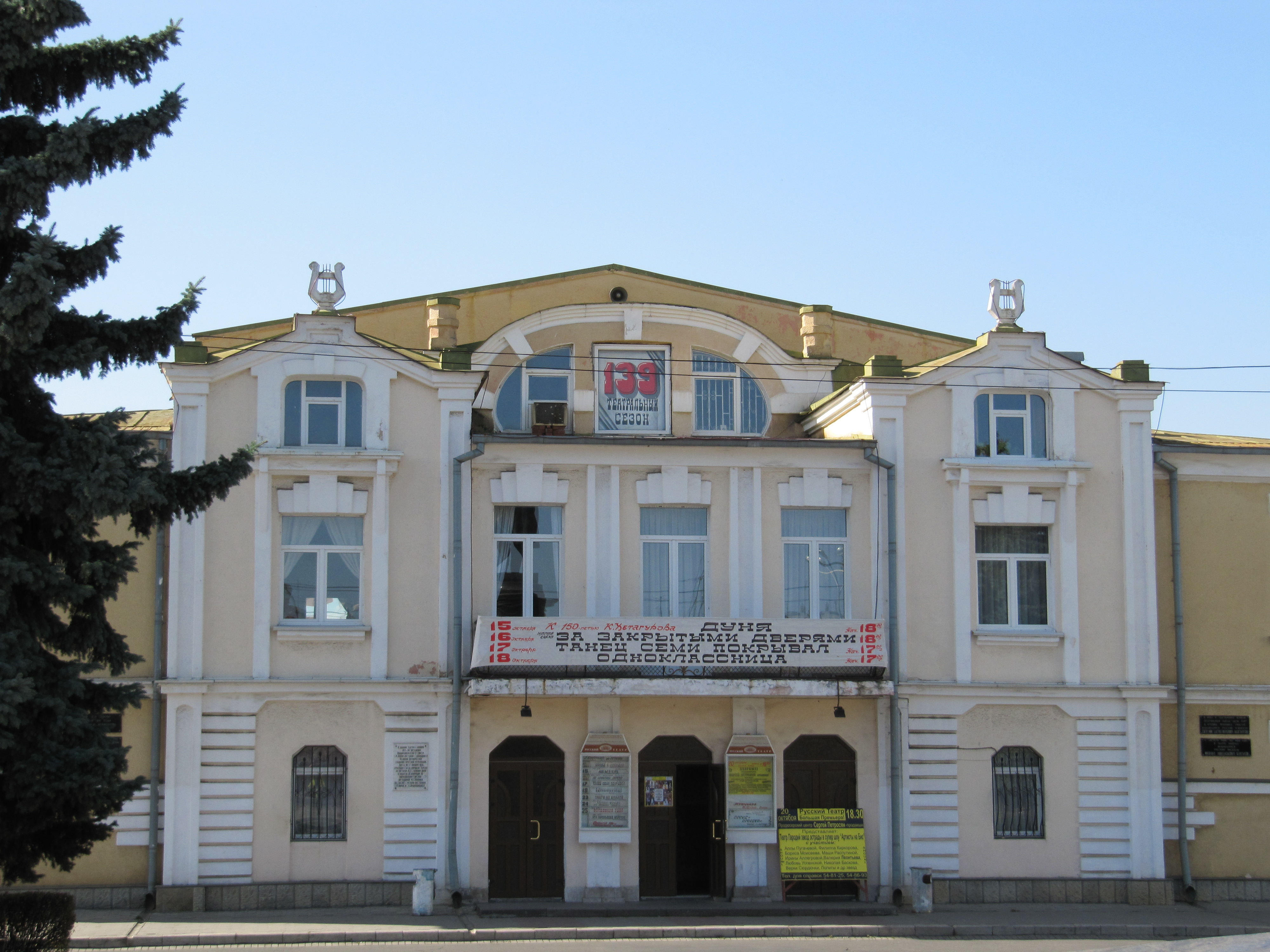 Владикавказ. Русский академический театр им. Евгения Вахтангова Ирон: Дзæуджыхъæу. Евгений Вахтанговы номыл Уырыссаг драмон театр